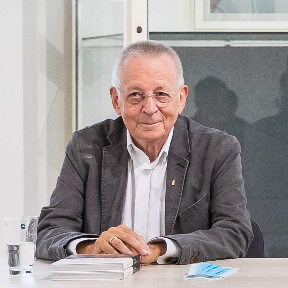 Buchvorstellung „Köln. Eine Stadtgeschichte in Bildern“ im Kölnischen Stadtmuseum. Wolfgang F. Meier, Fotograf und Dr. Werner Schäfke, Autor Foto: Dr. Werner Schäfke